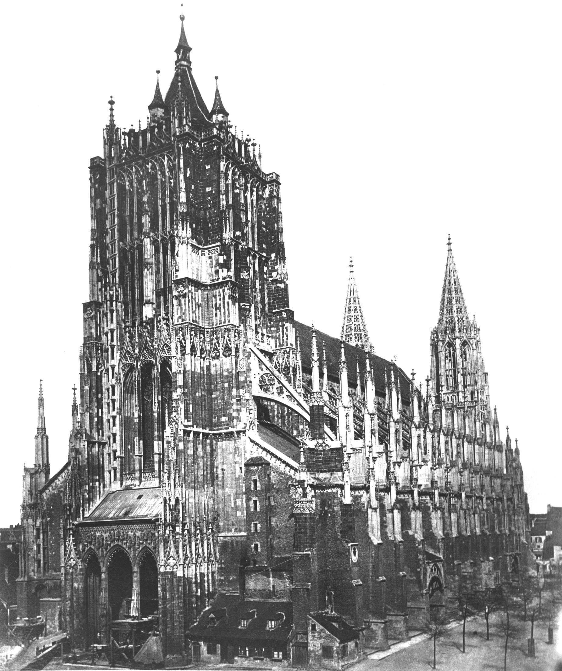 Das Ulmer Münster im Jahr 1887